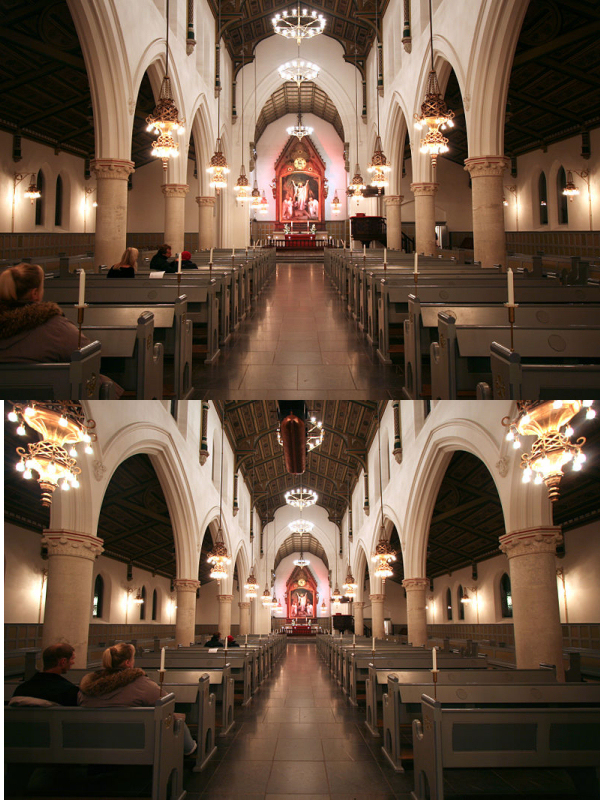 Sankt Jakobs Kirke, Østerbro, Copenhagen Denmark. Interior. Wide angle (lower) and normal optics (upper).